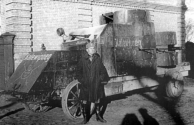 Kapten Einar Lundborg ja soomusauto "Kalevipoeg"